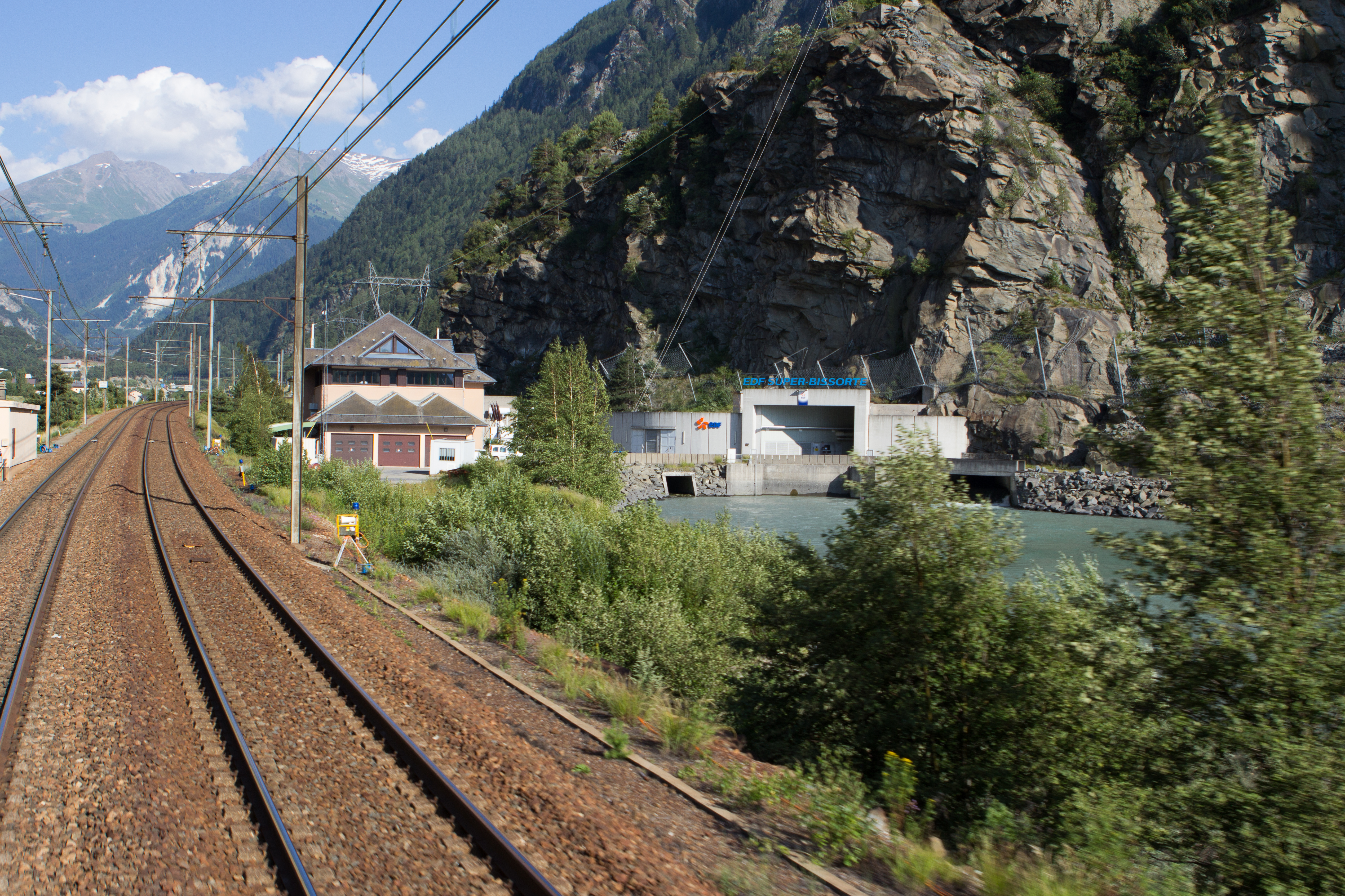 La ligne de la Maurienne, au niveau de la centrale hydraulique de Bissorte, vue en direction de Modane / commune d'Orelle, Savoie, France